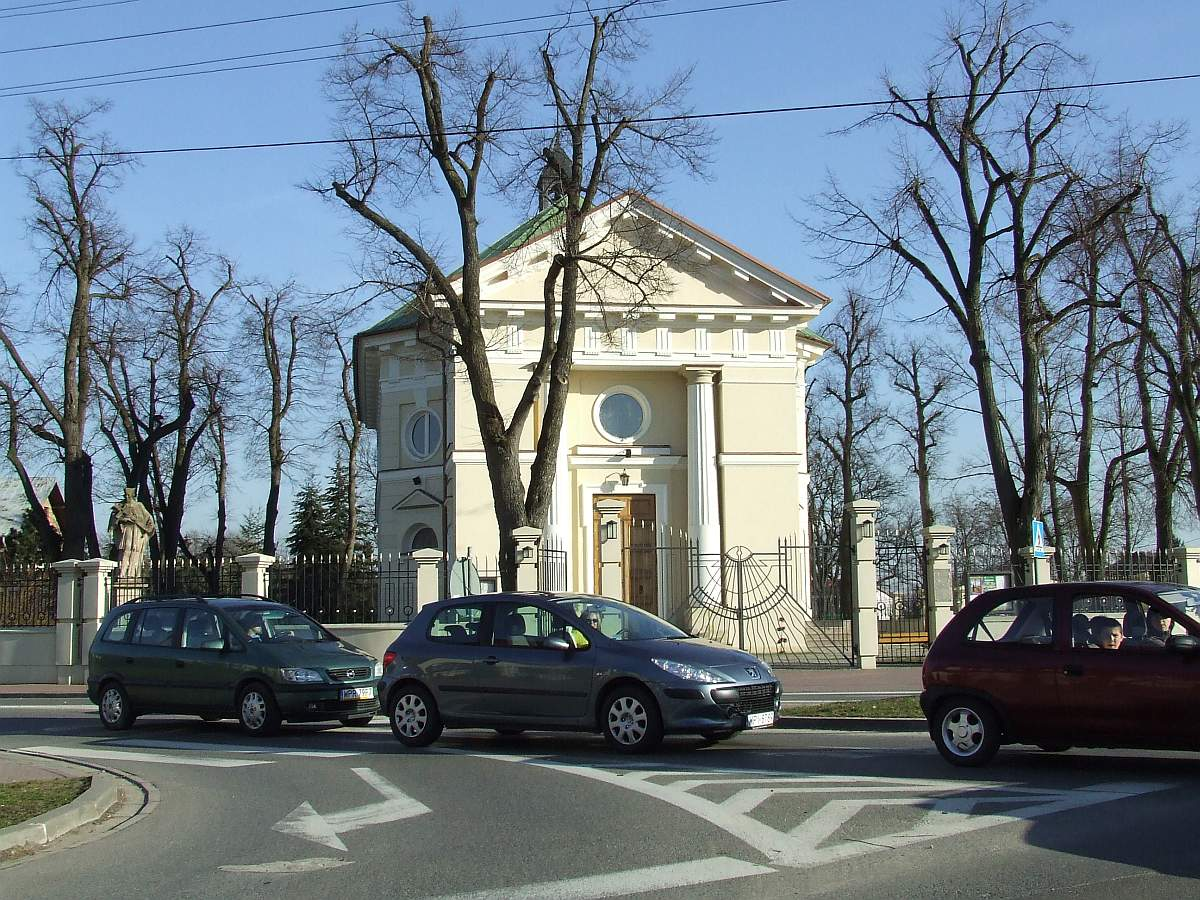 Kościół w Nadarzynie, gmina Nadarzyn 05.2000.